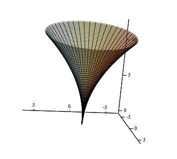 3D-plot in Mathcad, zelfgemaakt d.m.v. screenshot